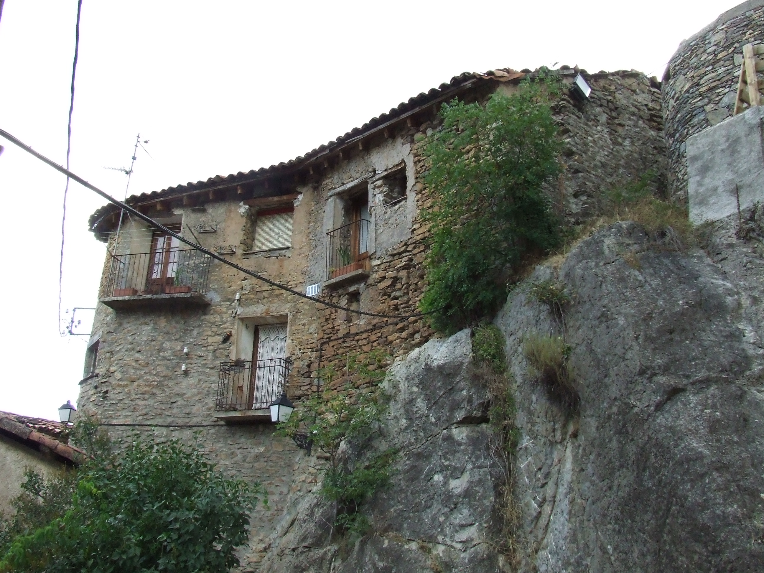 El Castellot de Beranui (Mont-ros, la Torre de Cabdella, Pallars Jussà)